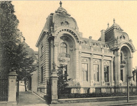 Palatul H. Spyer